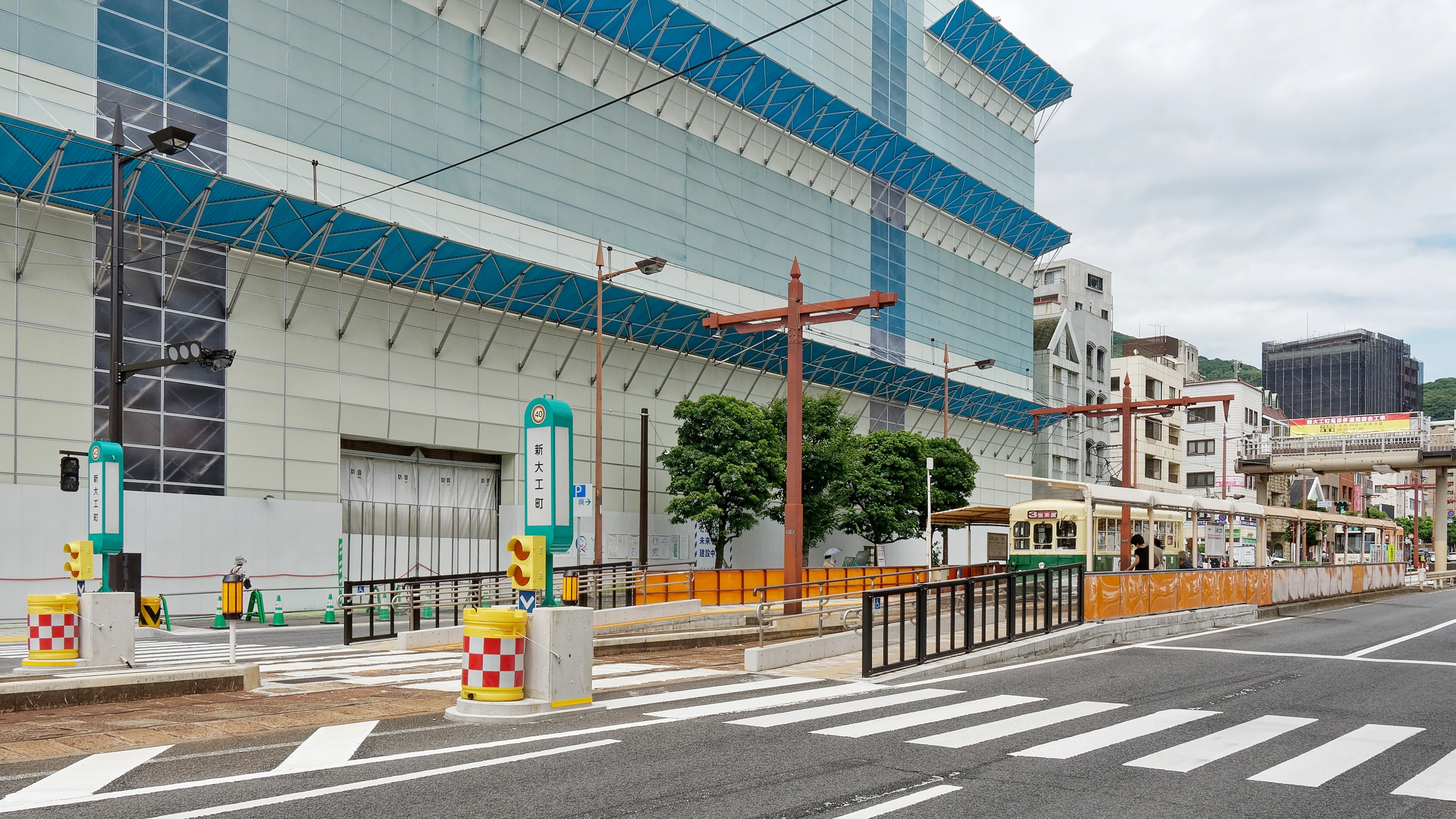 長崎電気軌道の新大工町停留場（長崎県長崎市）。